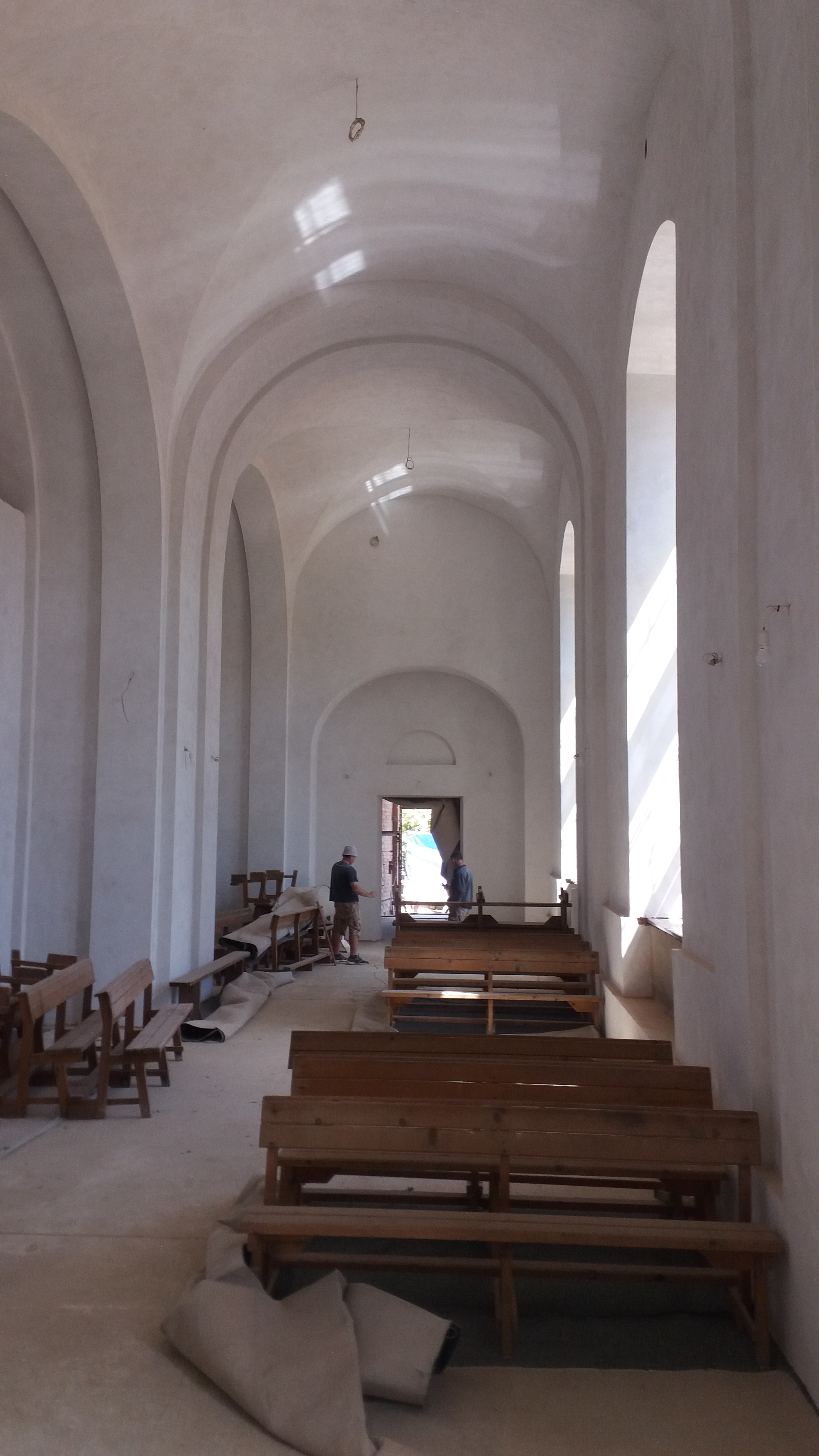 Костел Архангела Михаїла у Тиврові, Вінницька область, Україна